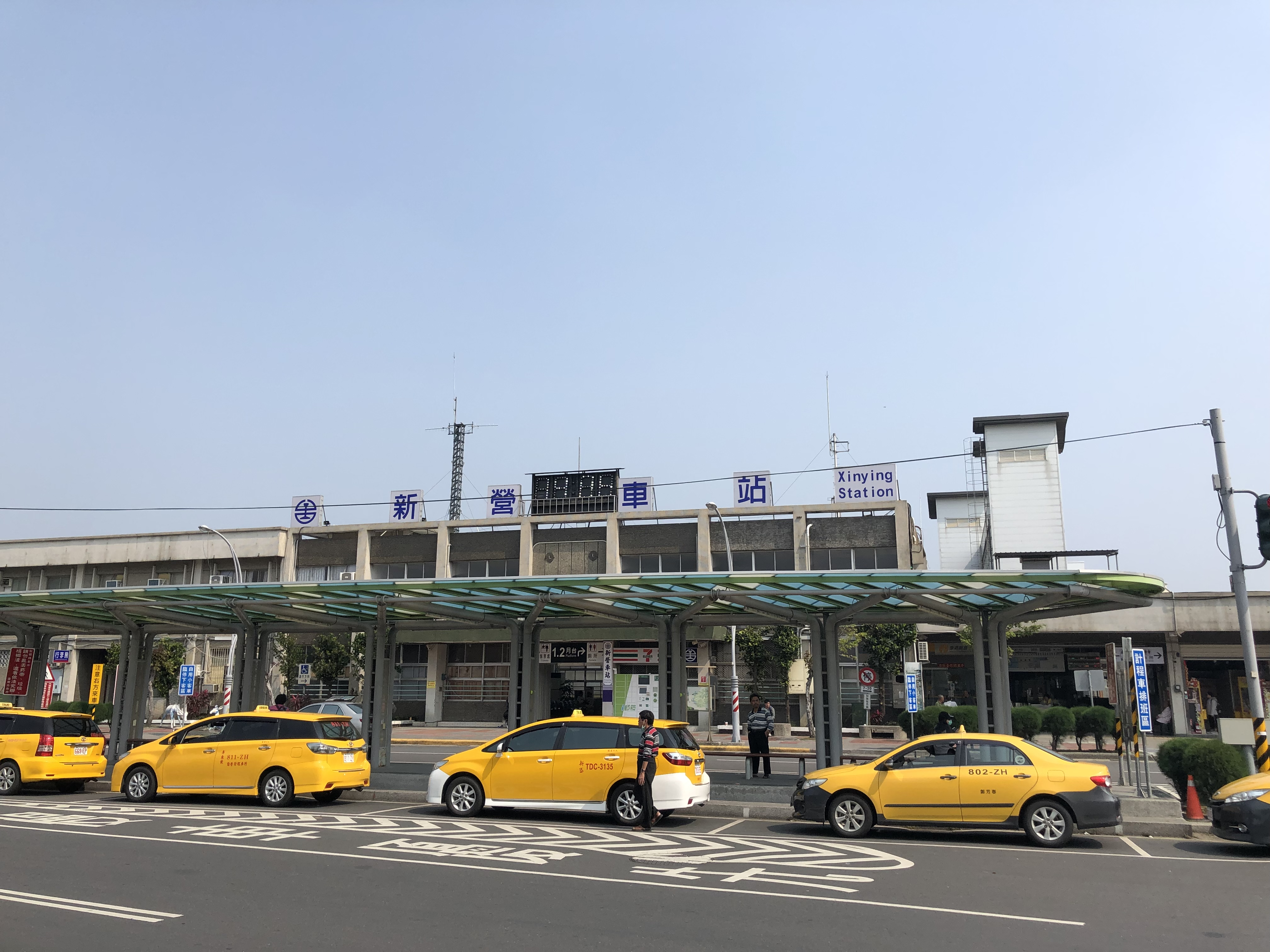 中文（台灣）: 臺灣鐵路管理局新營車站前站。